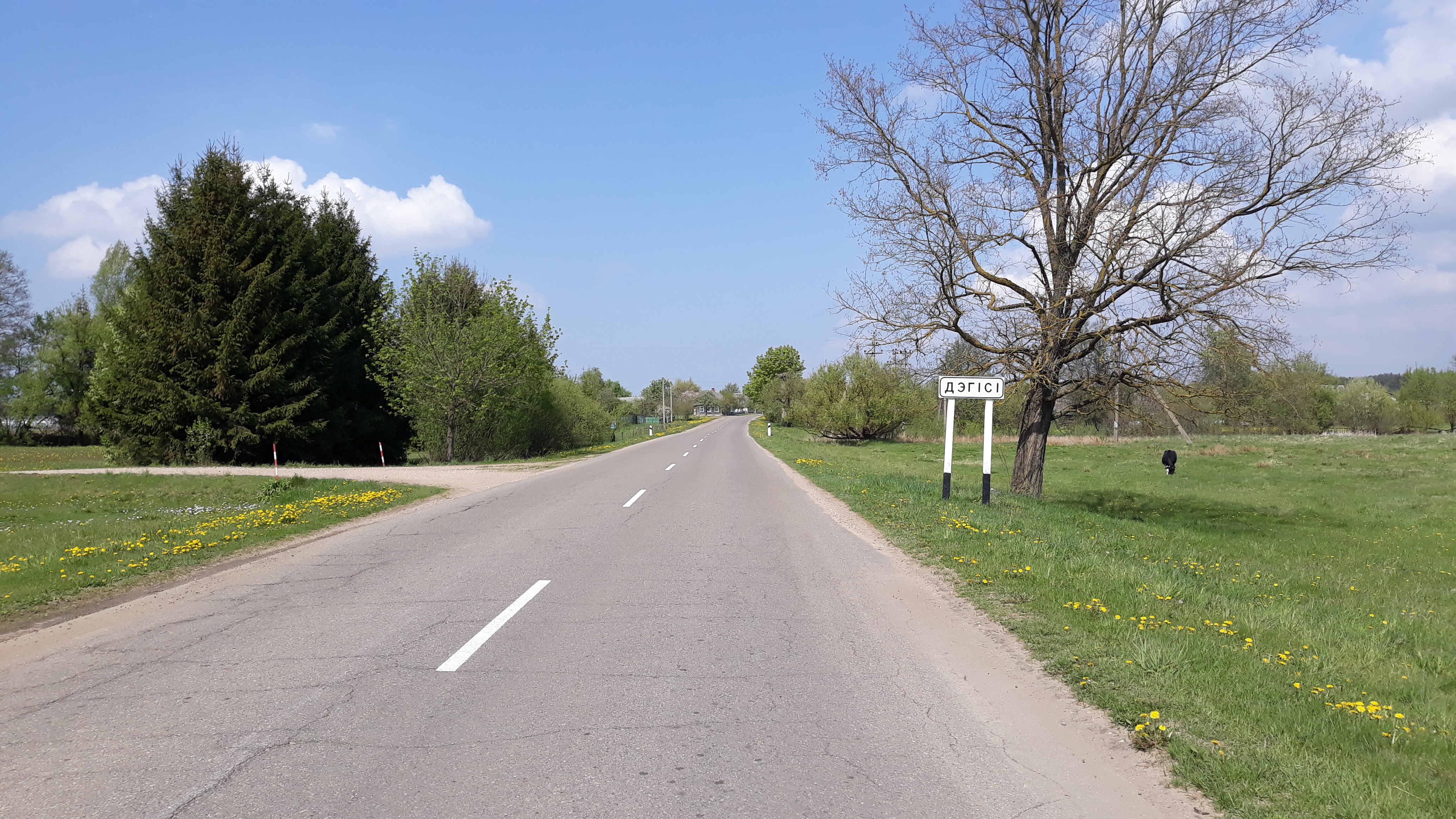 краявід вёскі